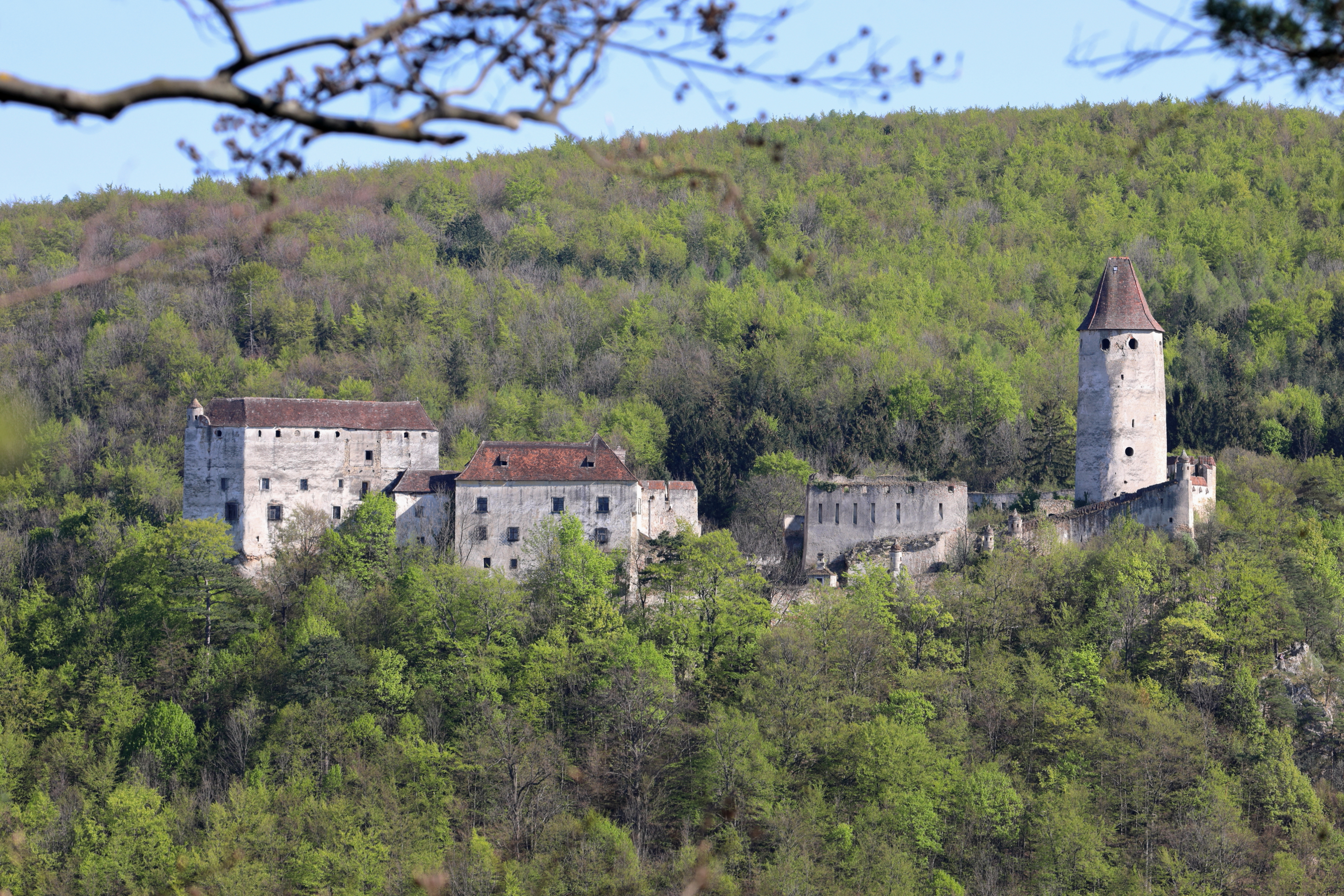 Nordwestansicht der Burg in der niederösterreichischen Gemeinde Seebenstein. Die mittelalterliche Burg wurde auf einem Felsrücken errichtet und vor allem im 17. Jahrhundert umgebaut und erweitert.